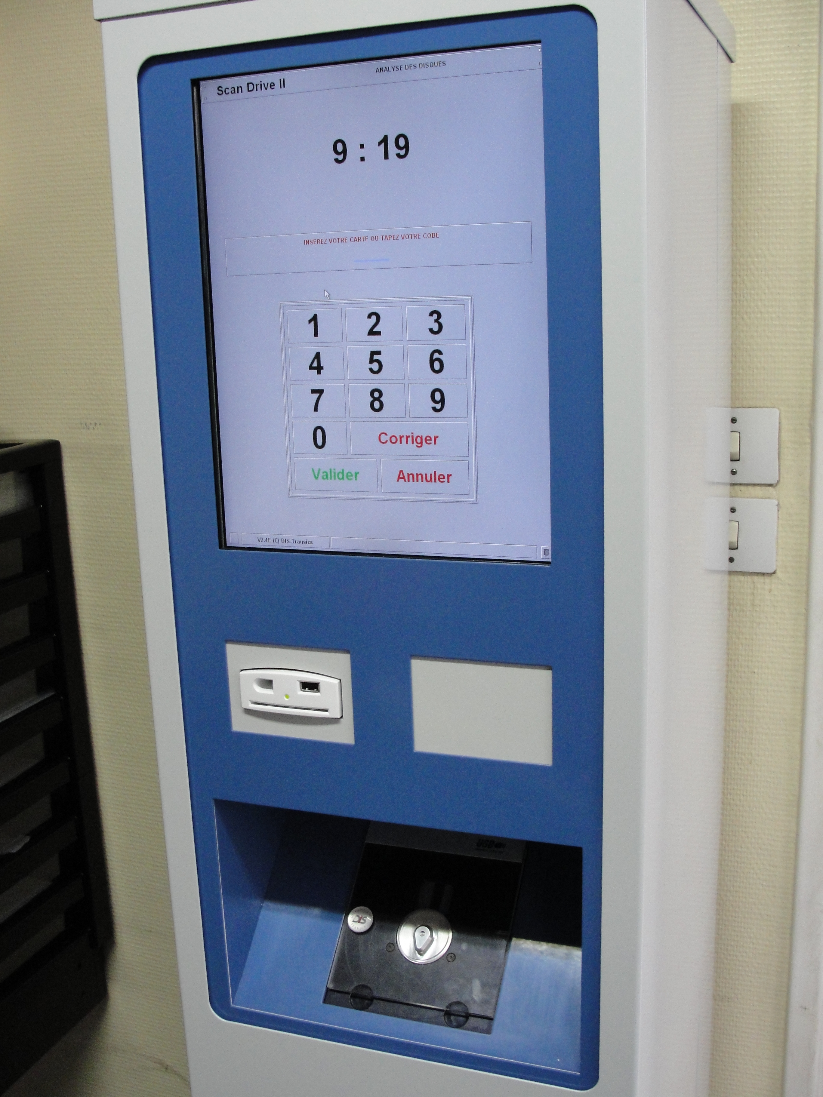 Borne de lecture de cartes et de disques chronotachygraphes d'une entreprise française de transport.